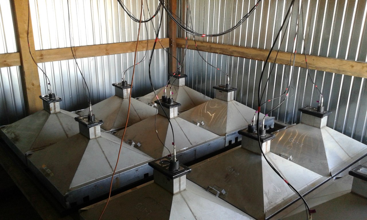 Внутренняя часть установки Tunka-Grande